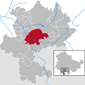 Hildburghausen in Thuringia - district Hildburghausen